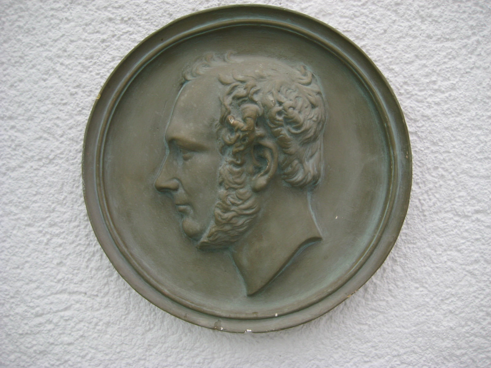 Gipsabdruck seines feinen Kopfes auf seinem Grabdenkmal auf dem Friedhof am Klagesmarkte